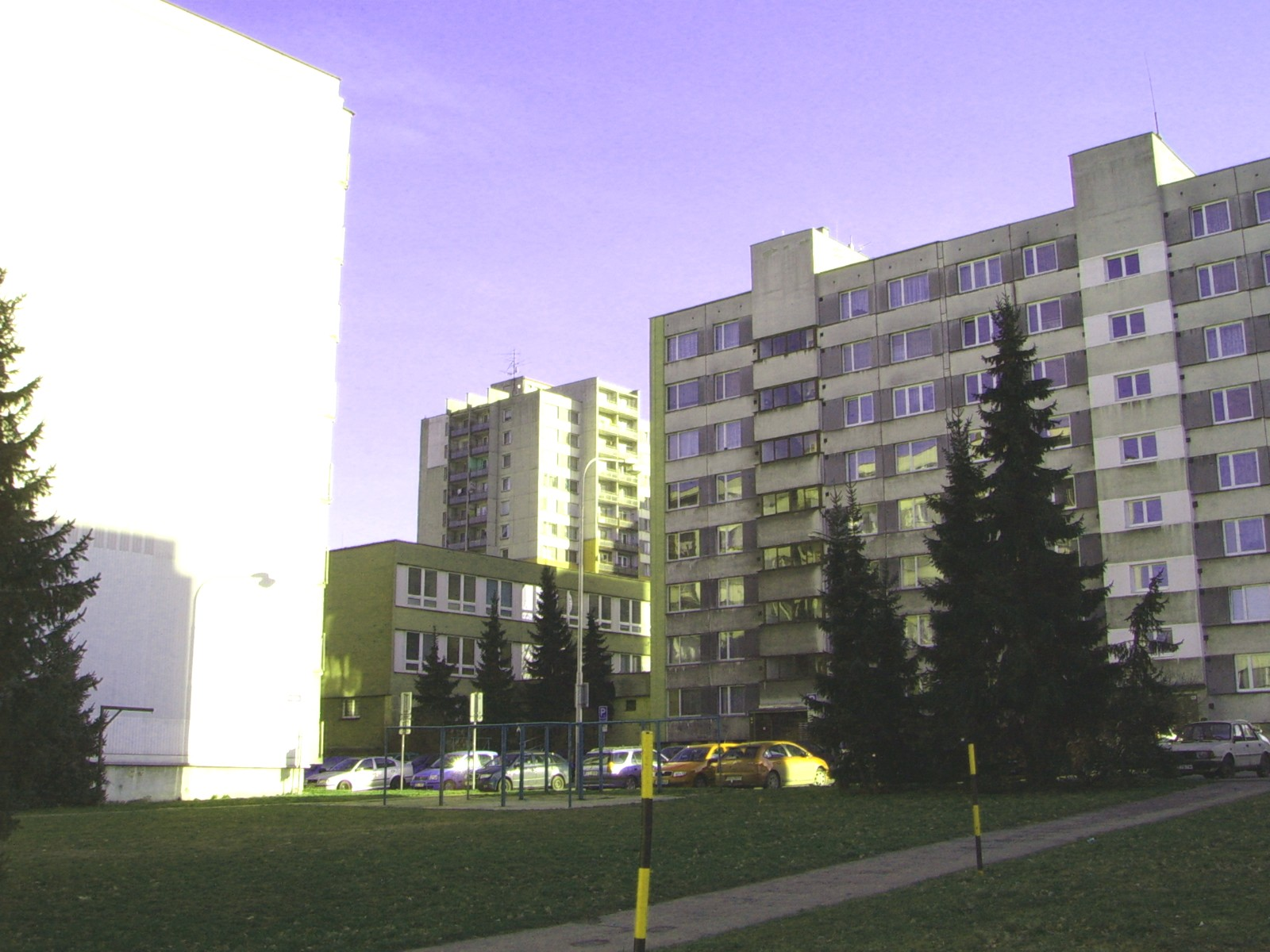 Výškovice, Lumírova